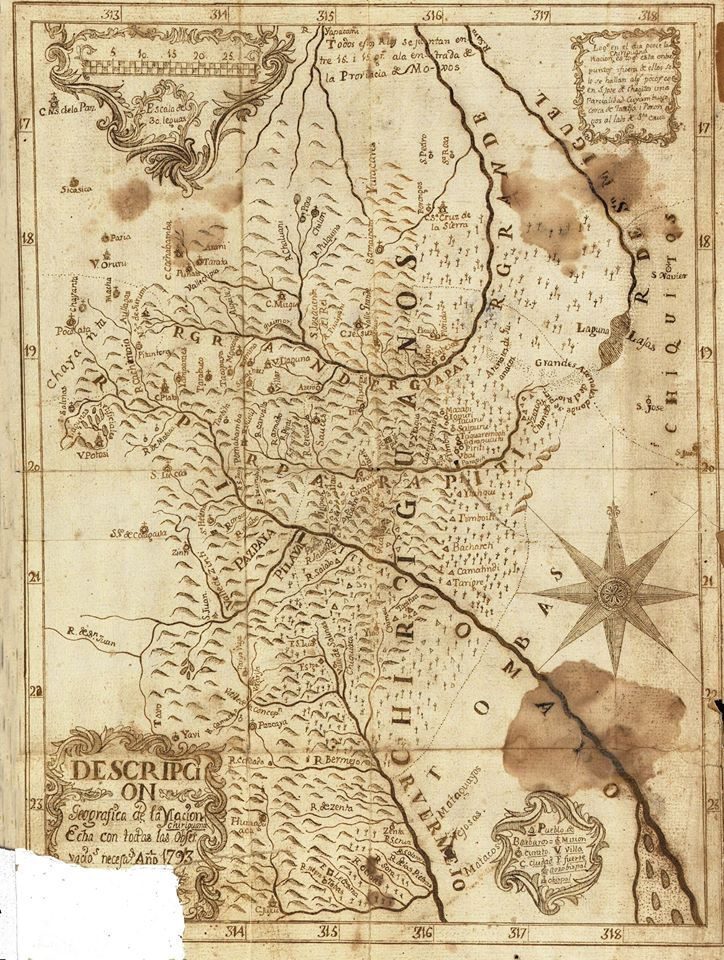 Descripción geográfica de la nación Chiriguana, 1793. Documentos Escritos. Sala IX - Legajo 2730. Referencias: Pueblos de Bárbaros, Misión, Curato, Villa, Ciudad, Fuerte, Arzobispal, Obispal.